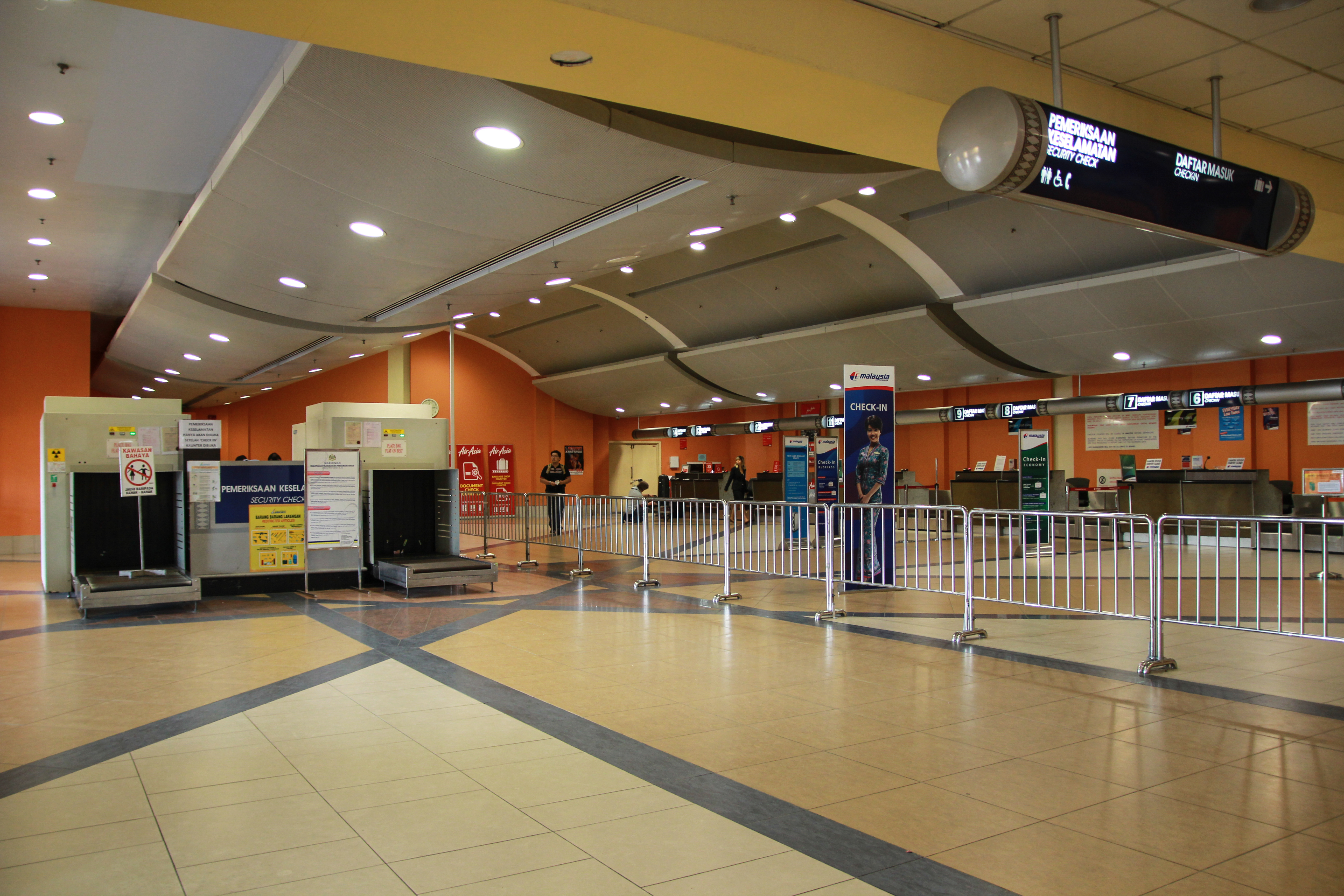 Flughafen Kota Bharu